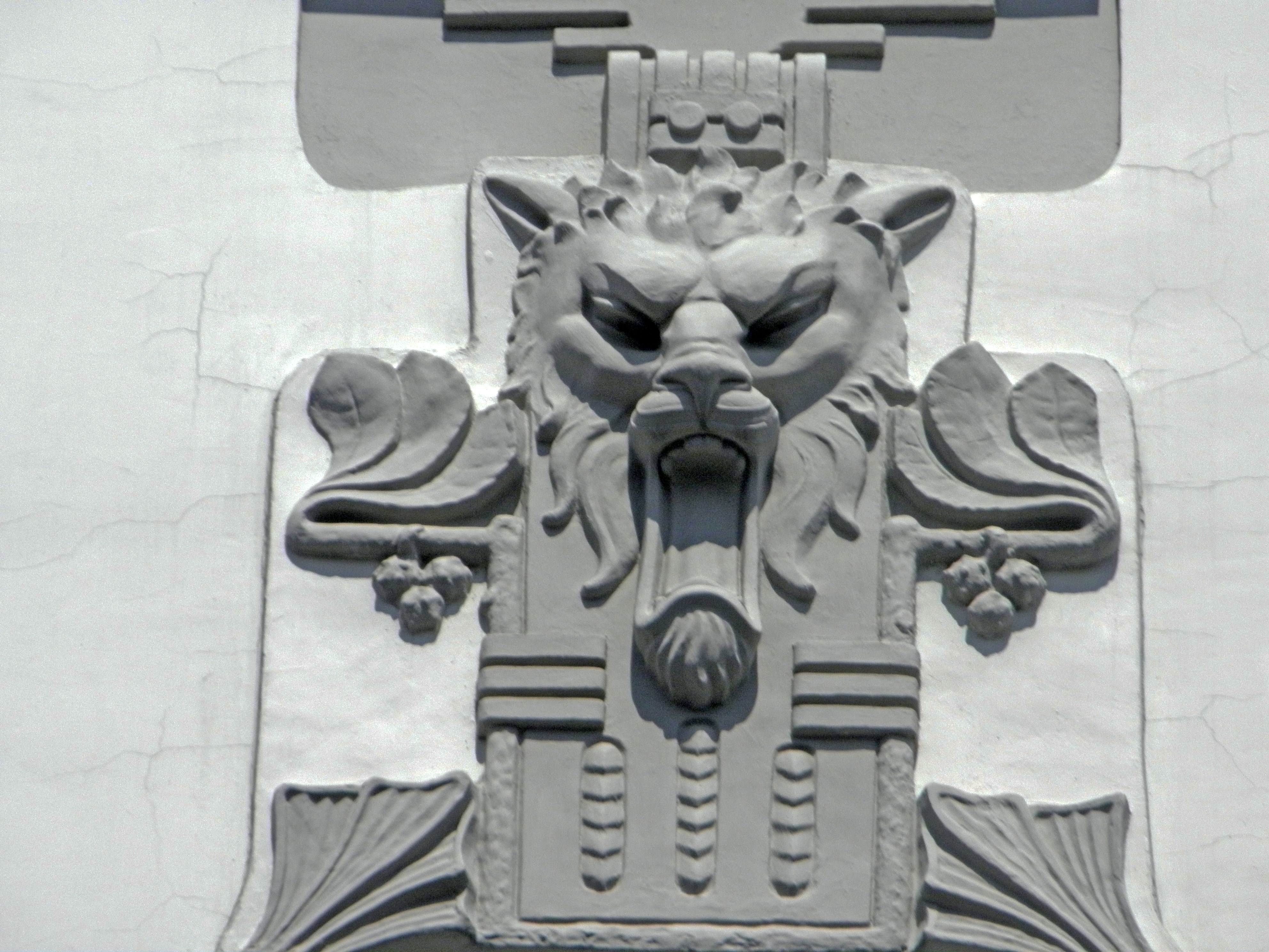 Будинок прибутковий, Київ, Ярославів Вал вул., 14-а